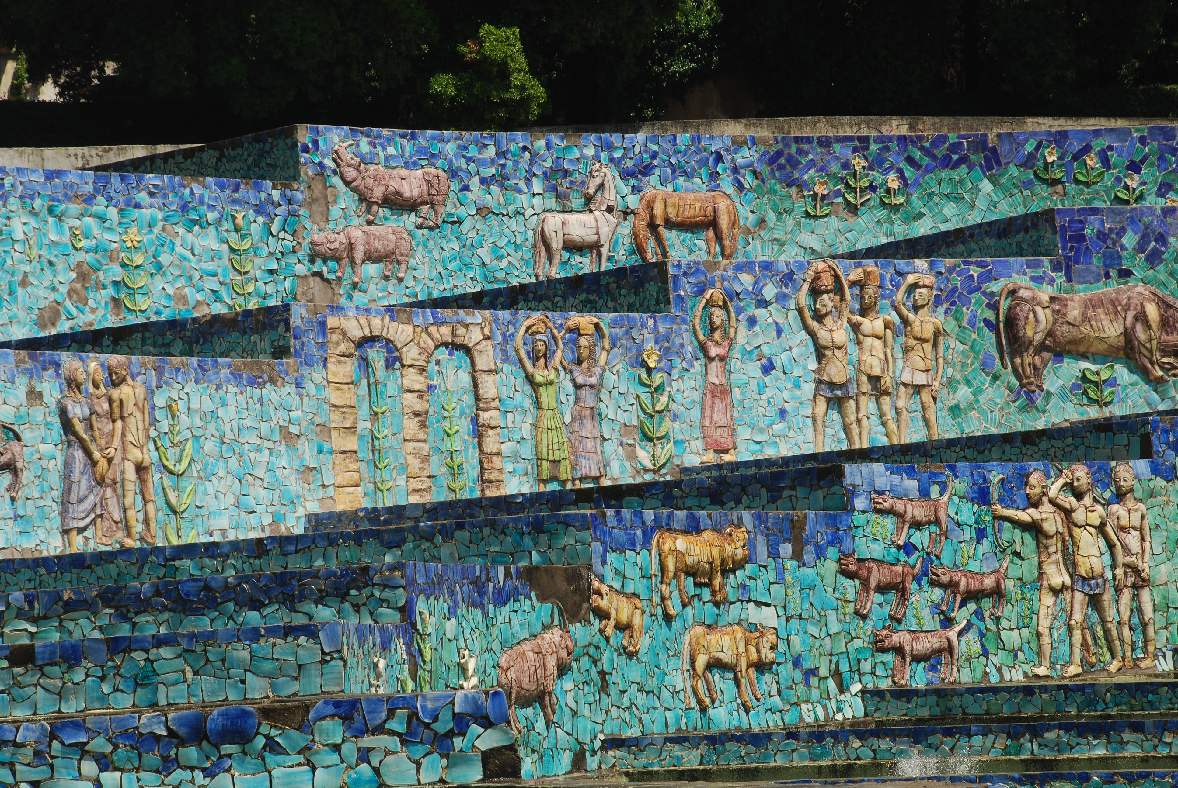 Fontana dell'Esedra, décoration de Francesco Macedonio